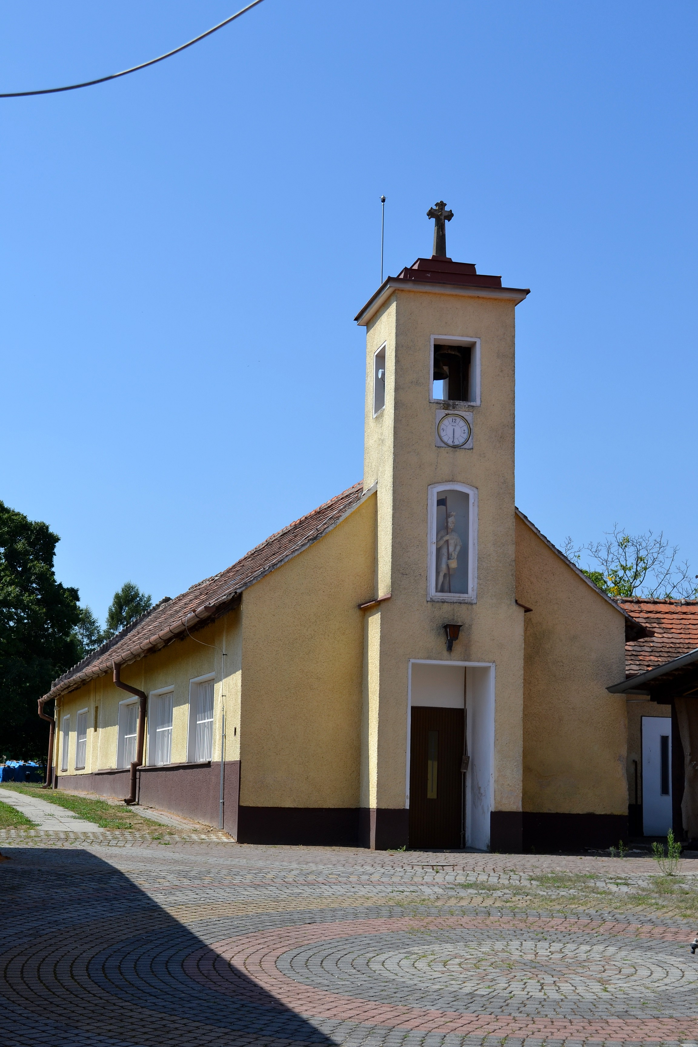 Dolné Dubové (okr, Trnava), Kaplnka svätého Jozefa Kalazánskeho - časť bývalého piaristického kláštora